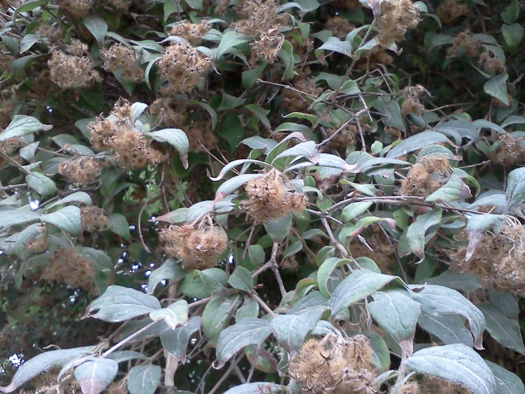 Kolkwitzia amabilis avec ses fruits